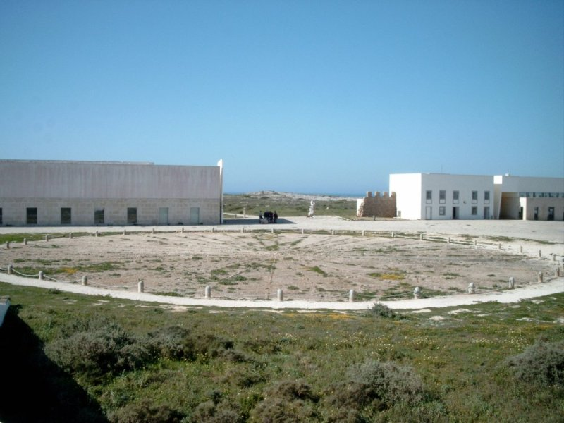 Windrose im Fortaleza de Sagres